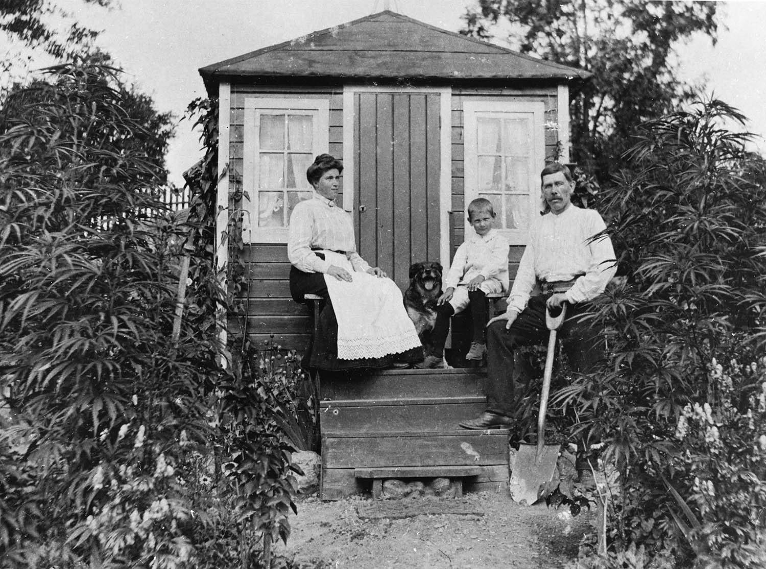 depicted place: Stockholm, Södermalm, Eriksdalslunden (Sverige (SE))